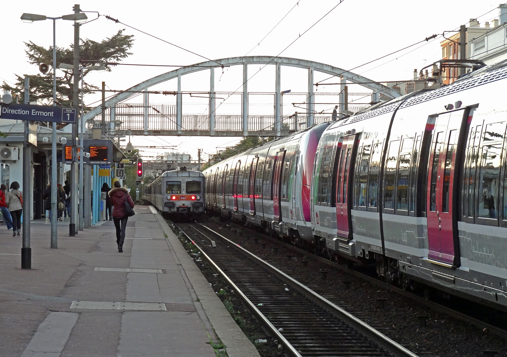 Z 6100 et Z 50000 en gare d'Enghien-les-Bains, Val-d'Oise, France.